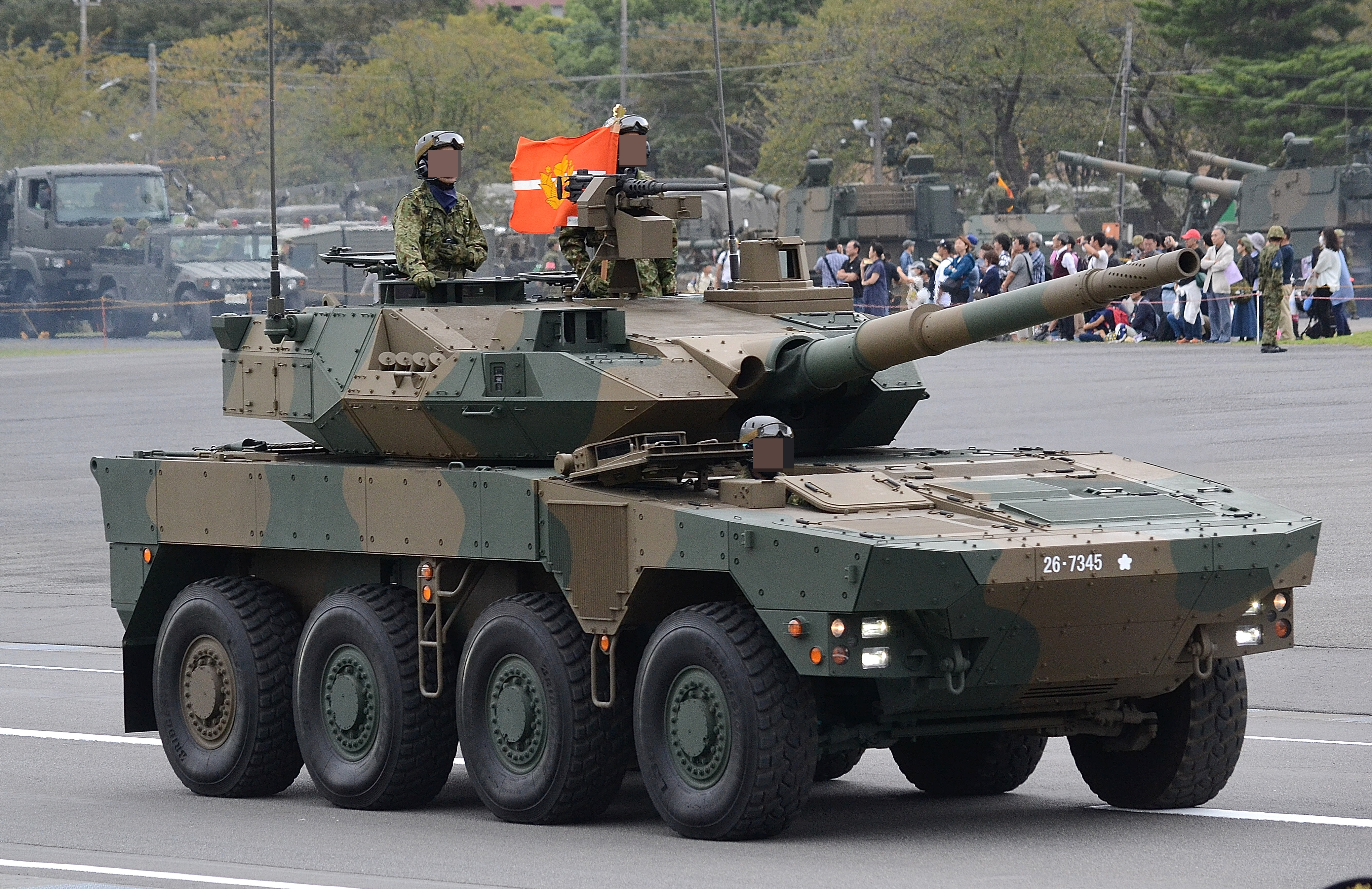 陸上自衛隊朝霞訓練場で行われた平成30年度自衛隊記念日観閲式総合予行での16式機動戦闘車。